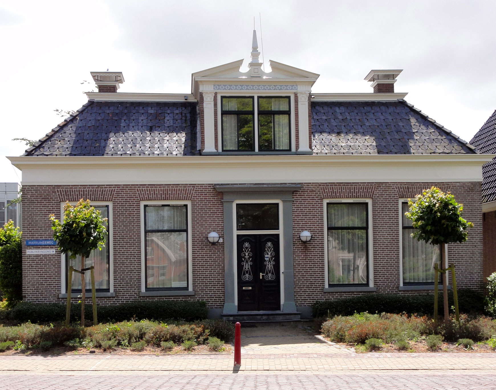 Marrumerweg 3 in Ferwerd